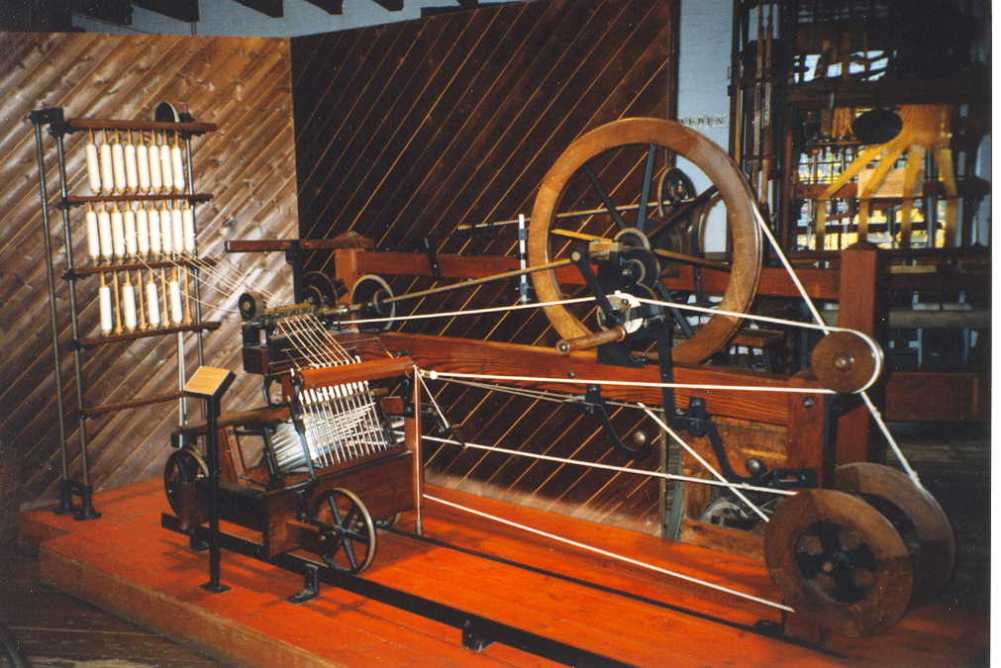 Modell einer Spinning Mule im historischen Zentrum Wuppertal, eigenes Bild, GNU FDL